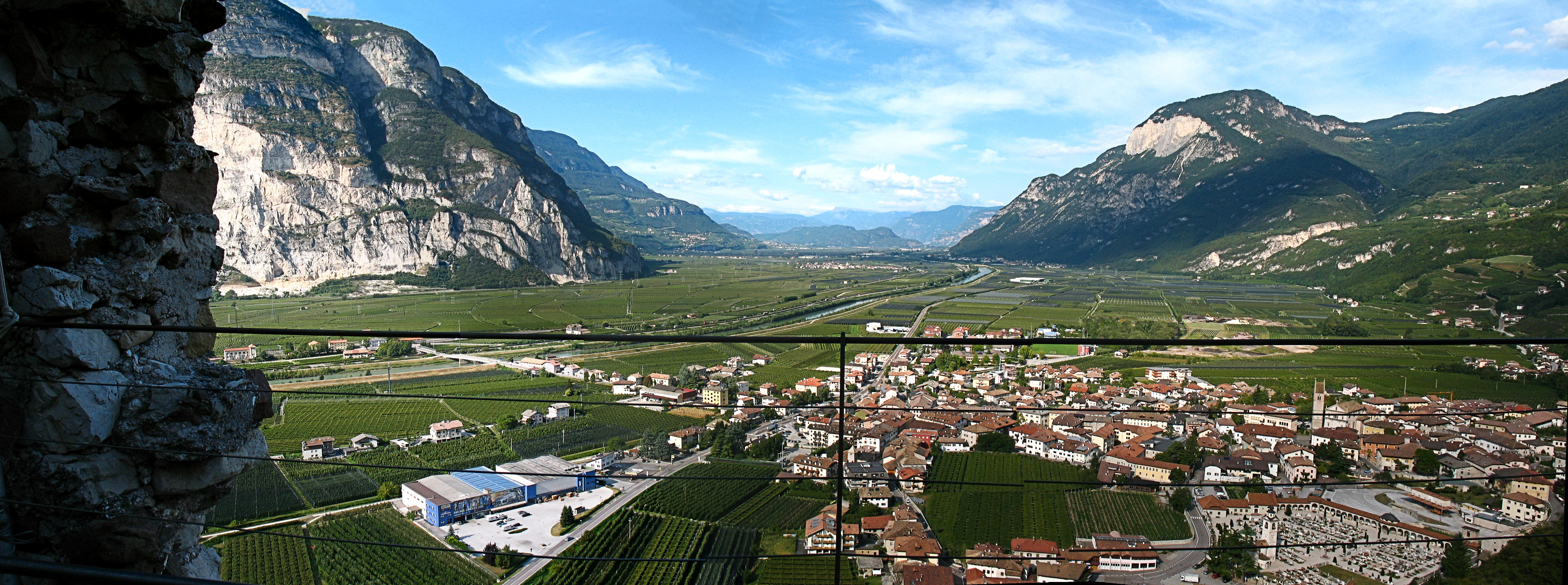 Italien, Südtirol, Haderburg, Aussichtsplattform, Blick Richtung Norden auf Salurn (Panorama-Bild)